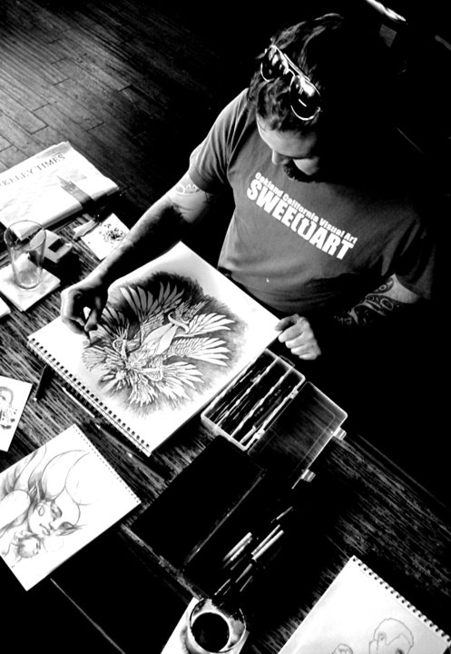 Obi Kaufmann in November 2010.